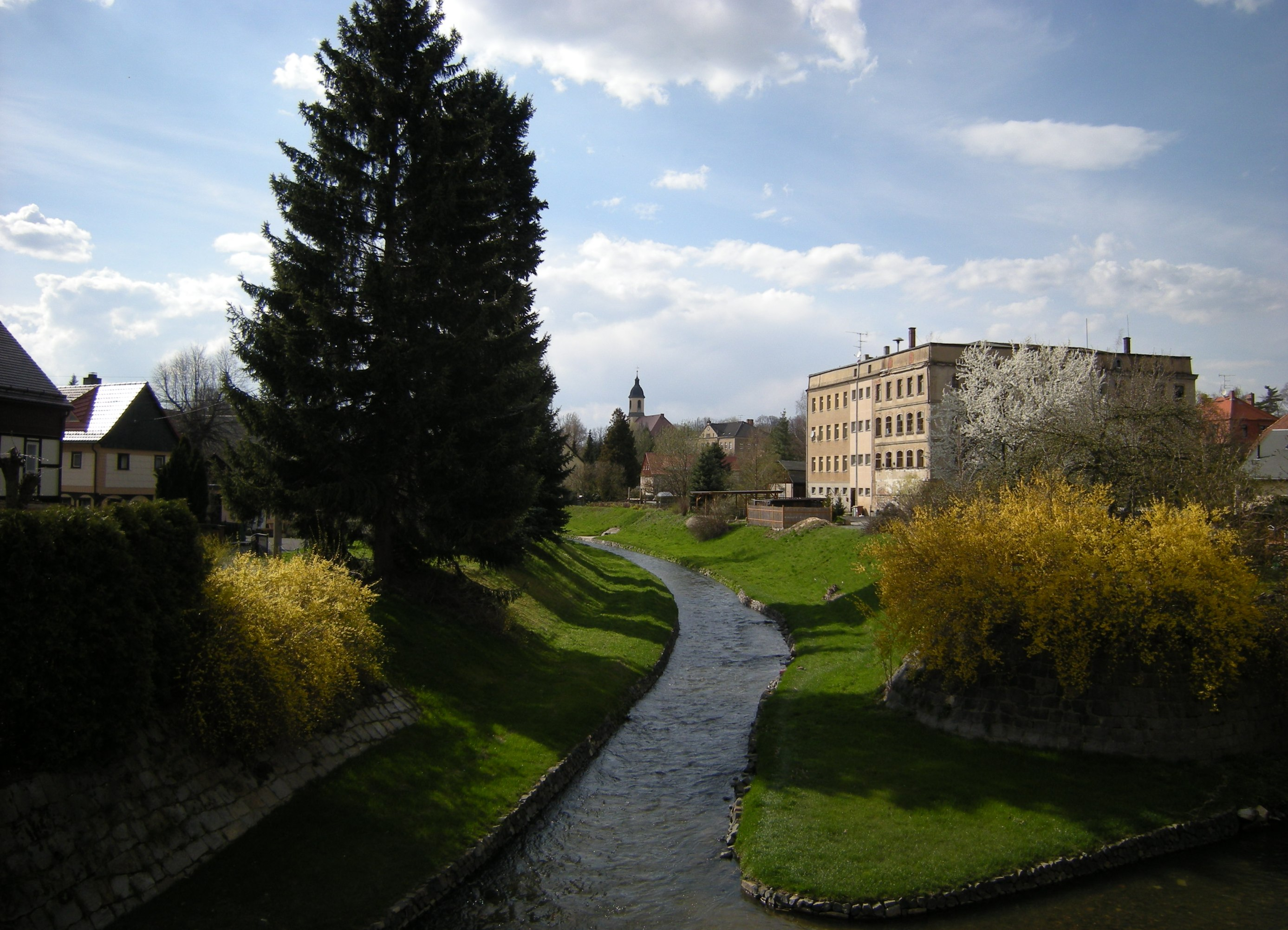 Seifhennersdorf (Zaruž)